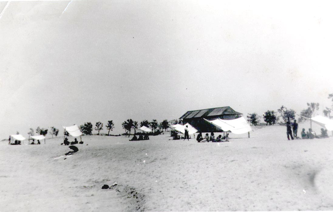 Uma das praias da Beira. Praia dos alemães